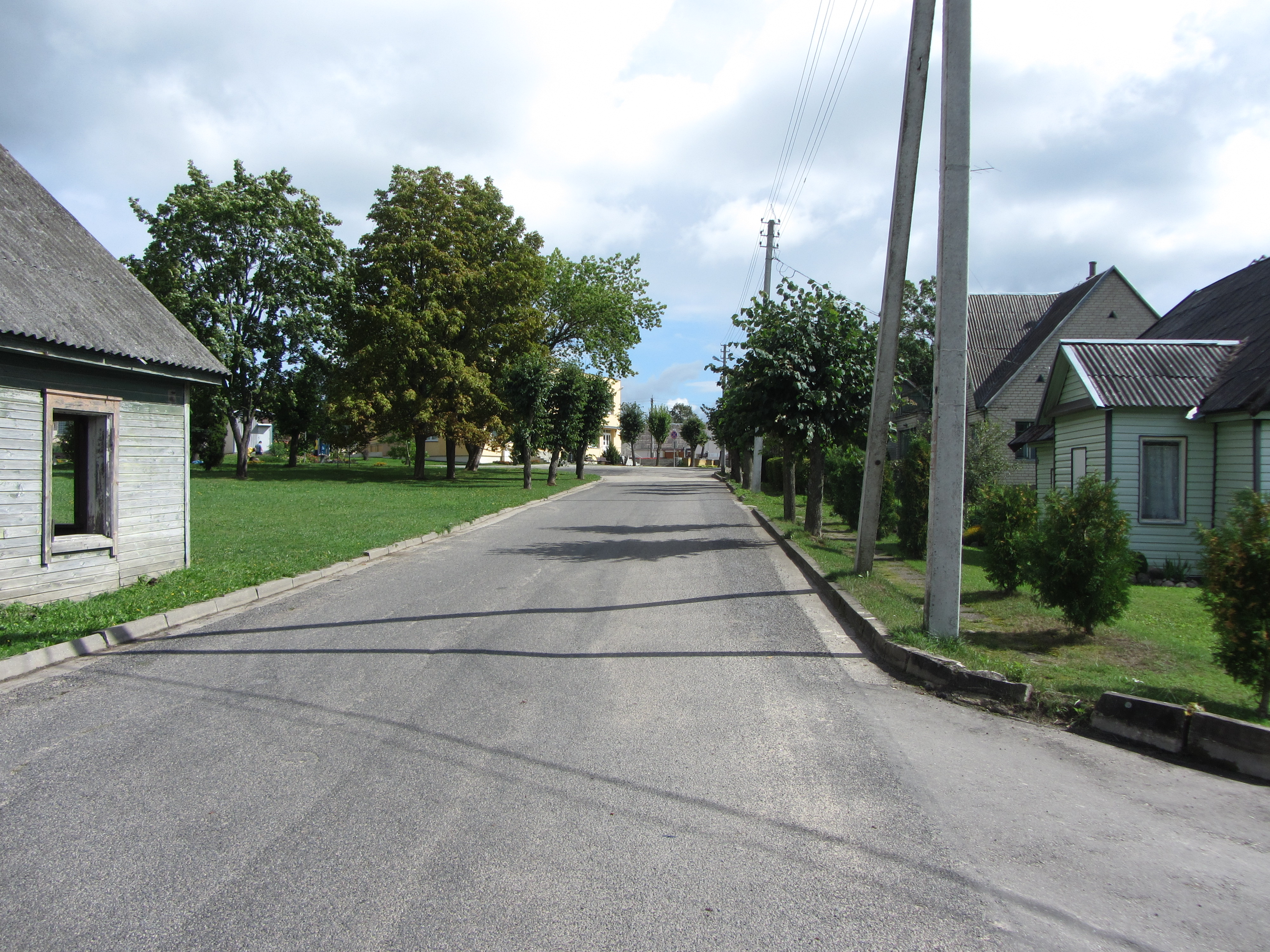 Dūkštas, Lithuania